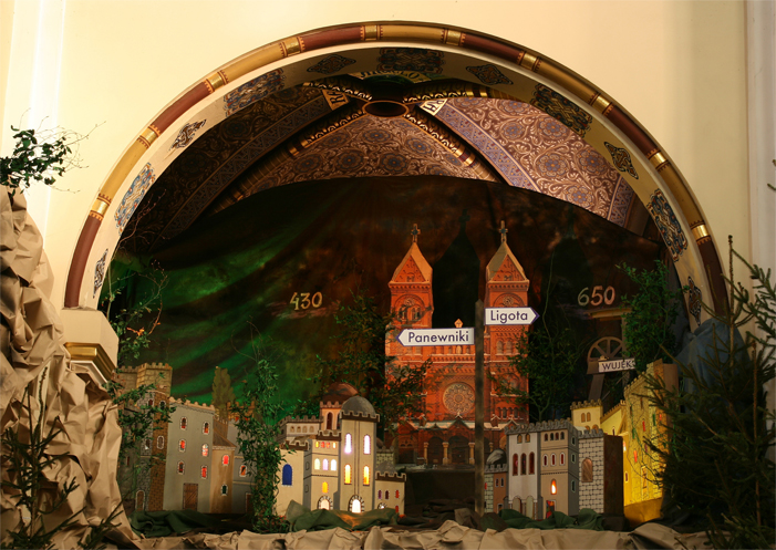 Crib in Katowice Panewniki, Poland (2009)